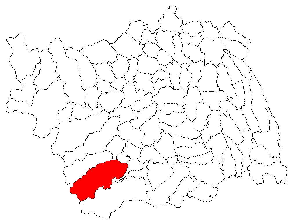 Categorie:Hărţi ale judeţului Bacău